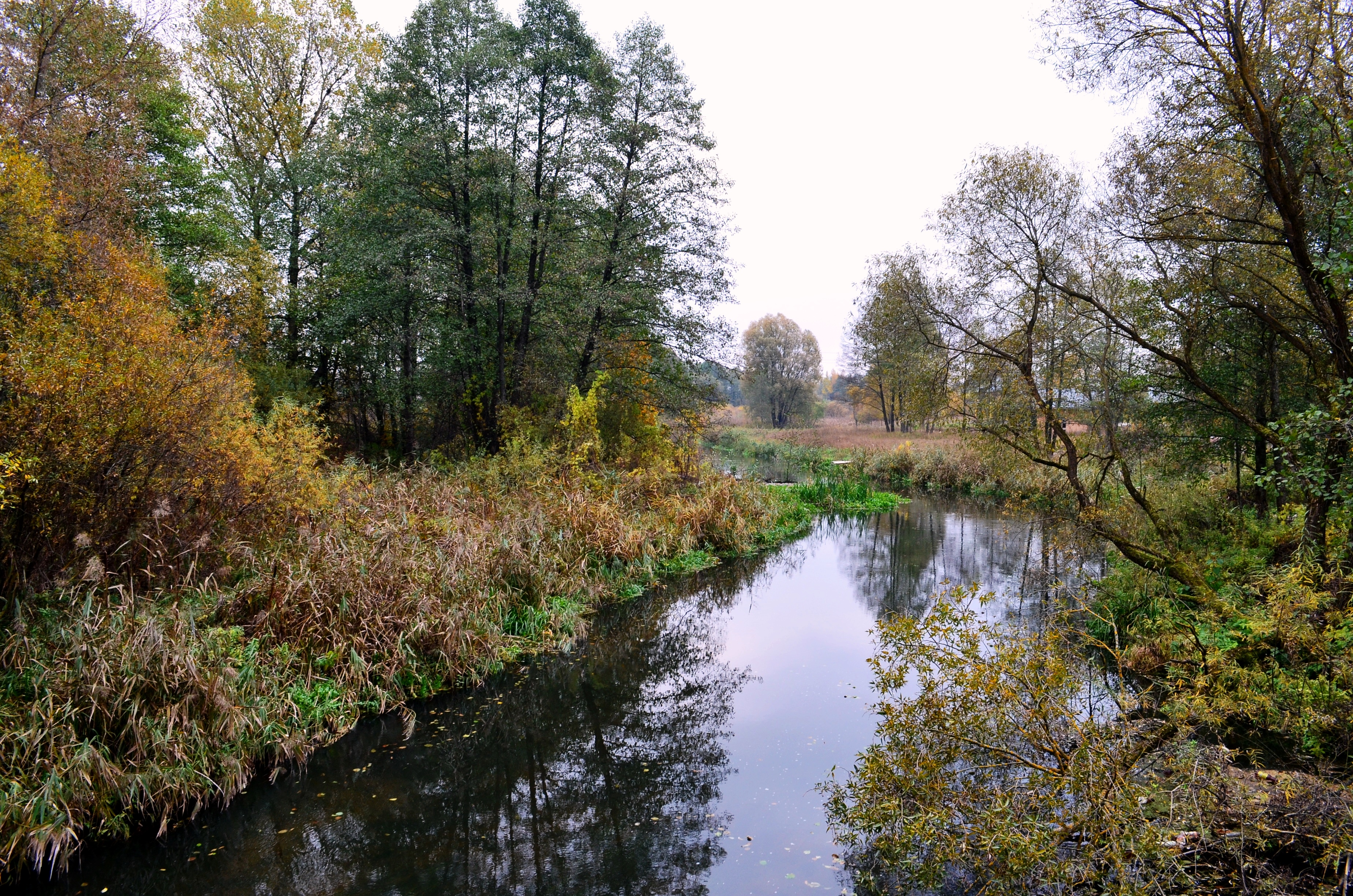 Vokė ties Vaidotais, Vilniaus r.